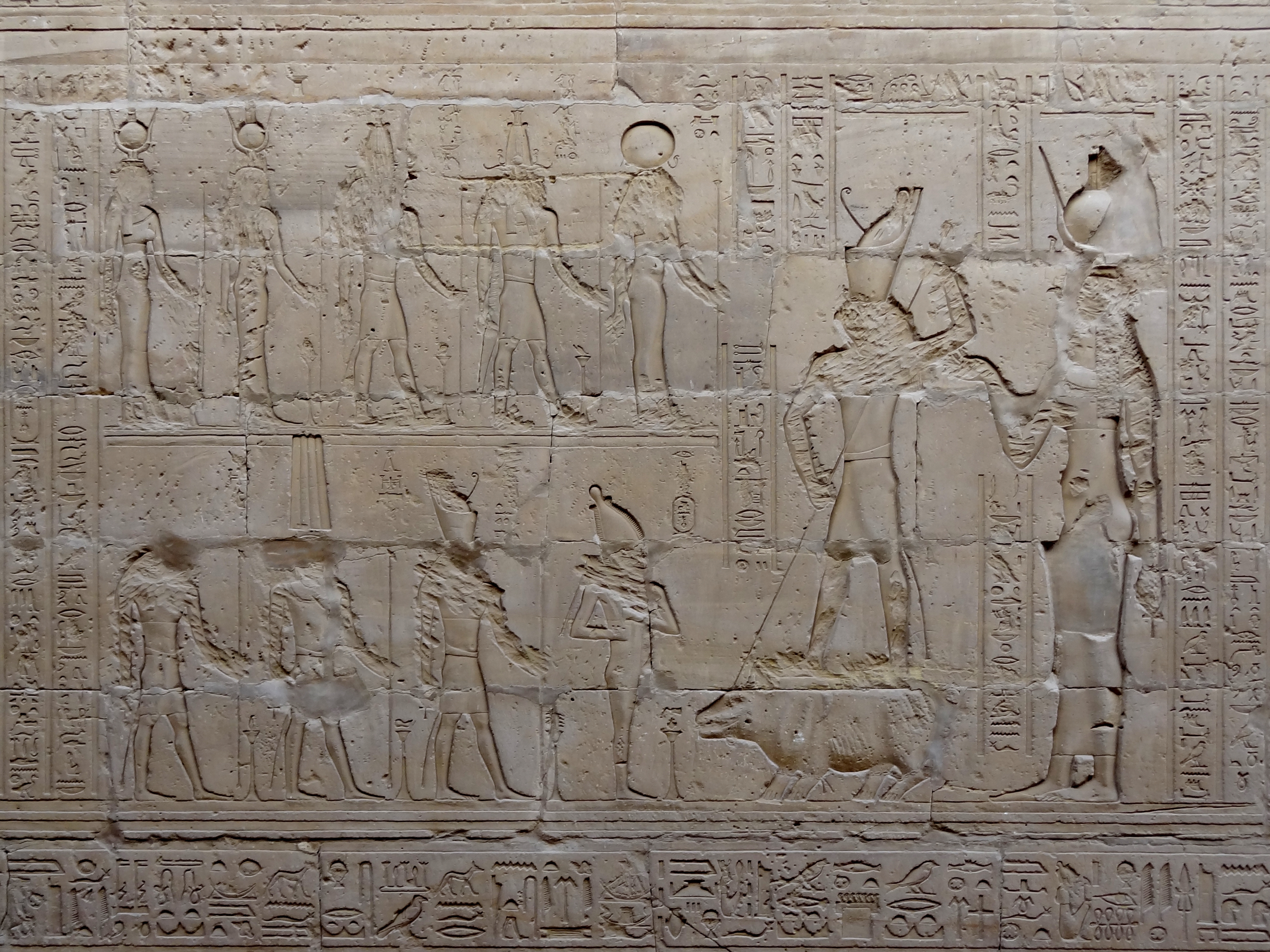 Relief im Tempel von Edfu, Ägypten